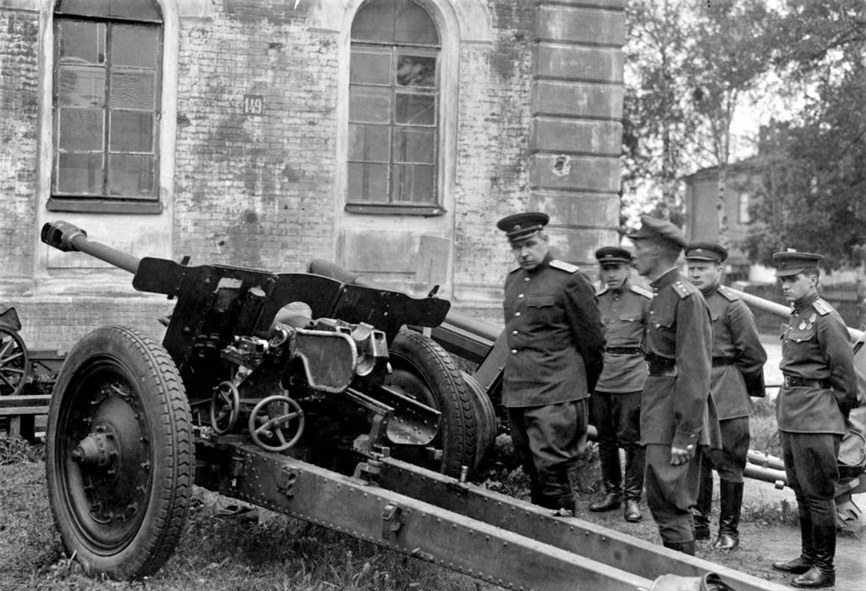 Ленинград. Командующий Ленинградским фронтом генерал-полковник Л.А. Говоров осматривает трофейные немецкие пушки. На переднем плане немецкая противотанковая пушка Pak 36(r)